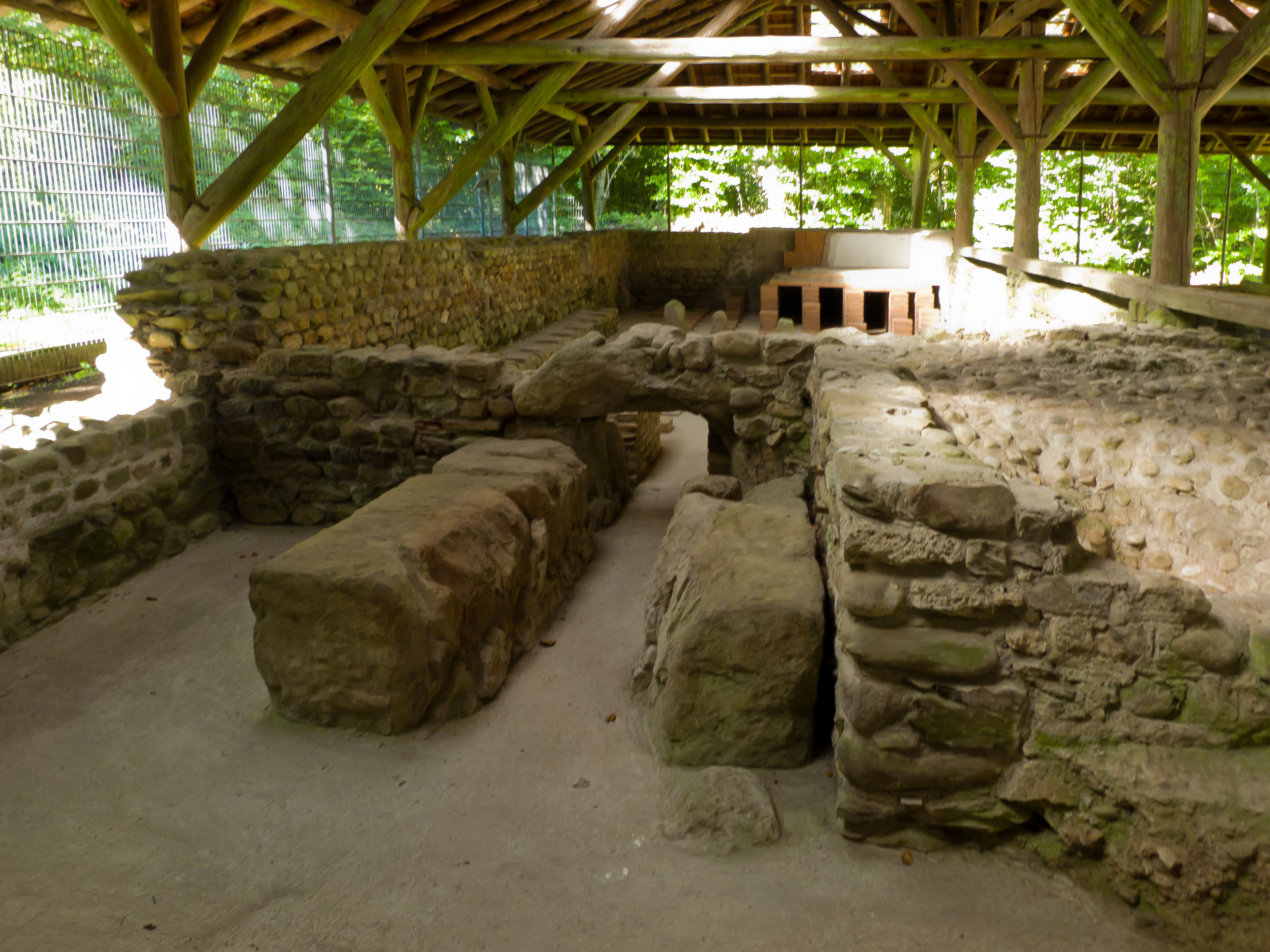 Engehalbinsel, Römisches Bad, mit Holocaustum (beheizter Fussboden)